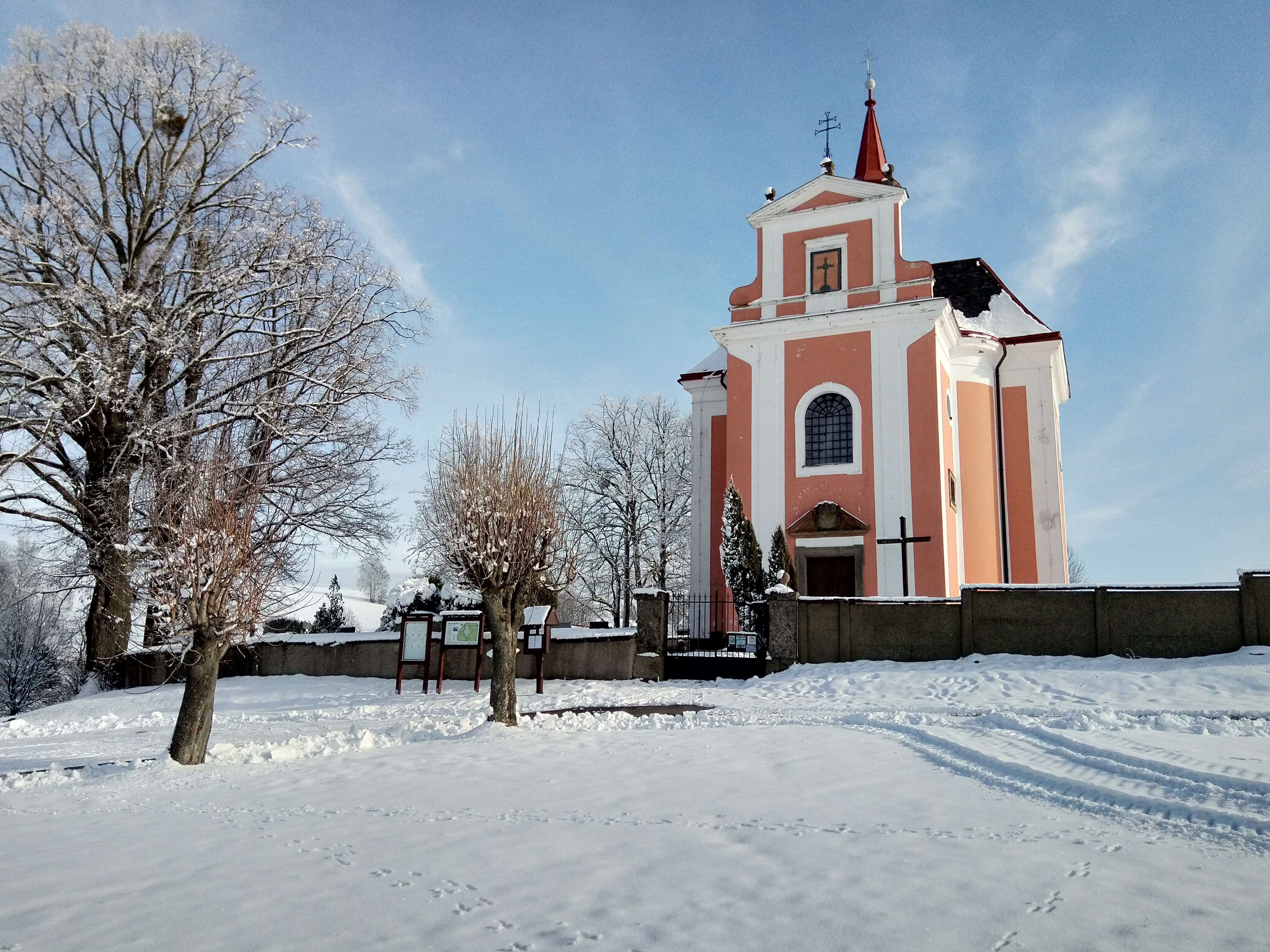 Kostel Svaté Anny (Pustá Kamenice)